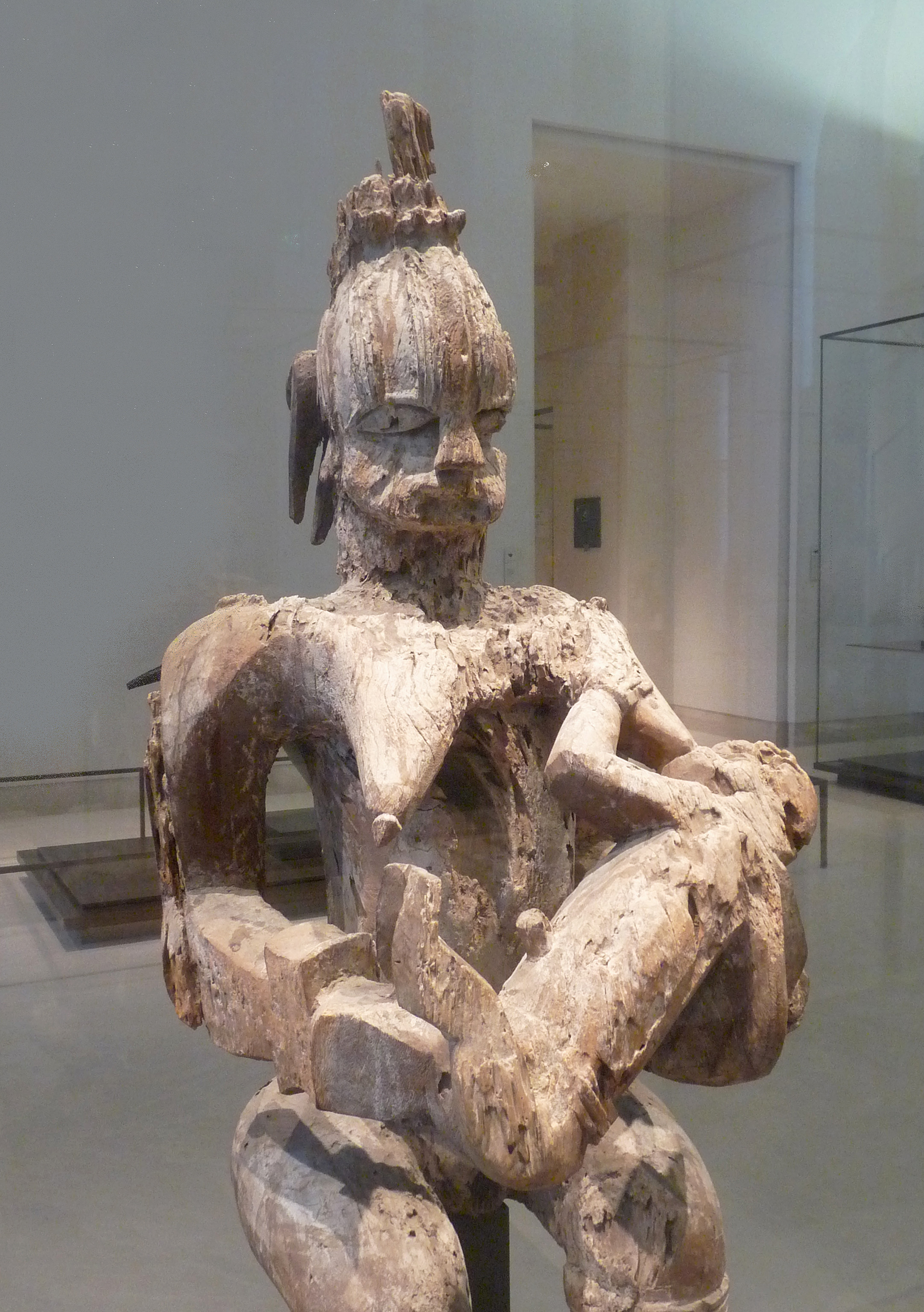 Sculpture urhobo en bois : figure de l'Emetejevwe, nièce du fondateur de la ville d'Eherhe. 18e siècle, Nigeria. Pavillon des Sessions, Louvre, Paris.